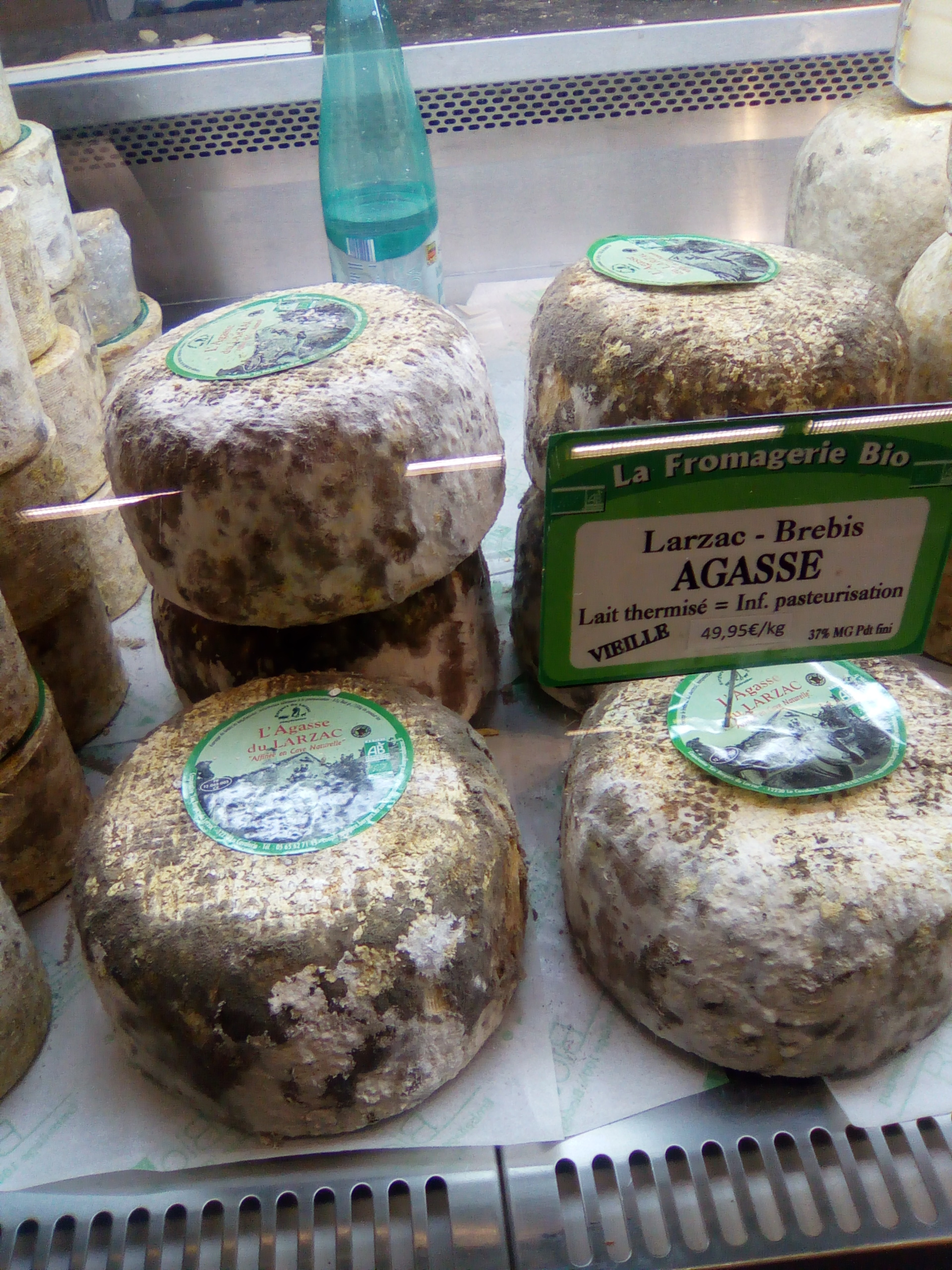 Stand au salon bio "Marjolaine"